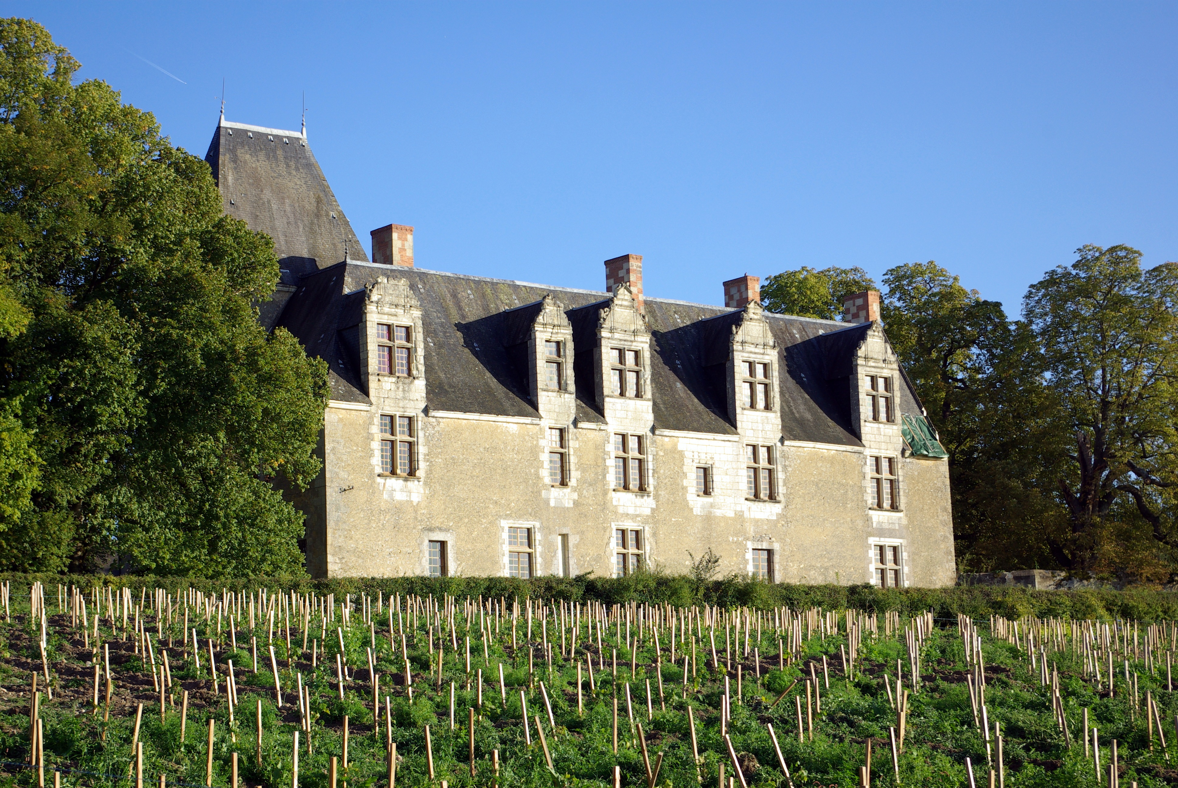 Château de la Cour-au-Berruyer, Cheillé. This building is en partie classé, en partie inscrit au titre des Monuments Historiques. .